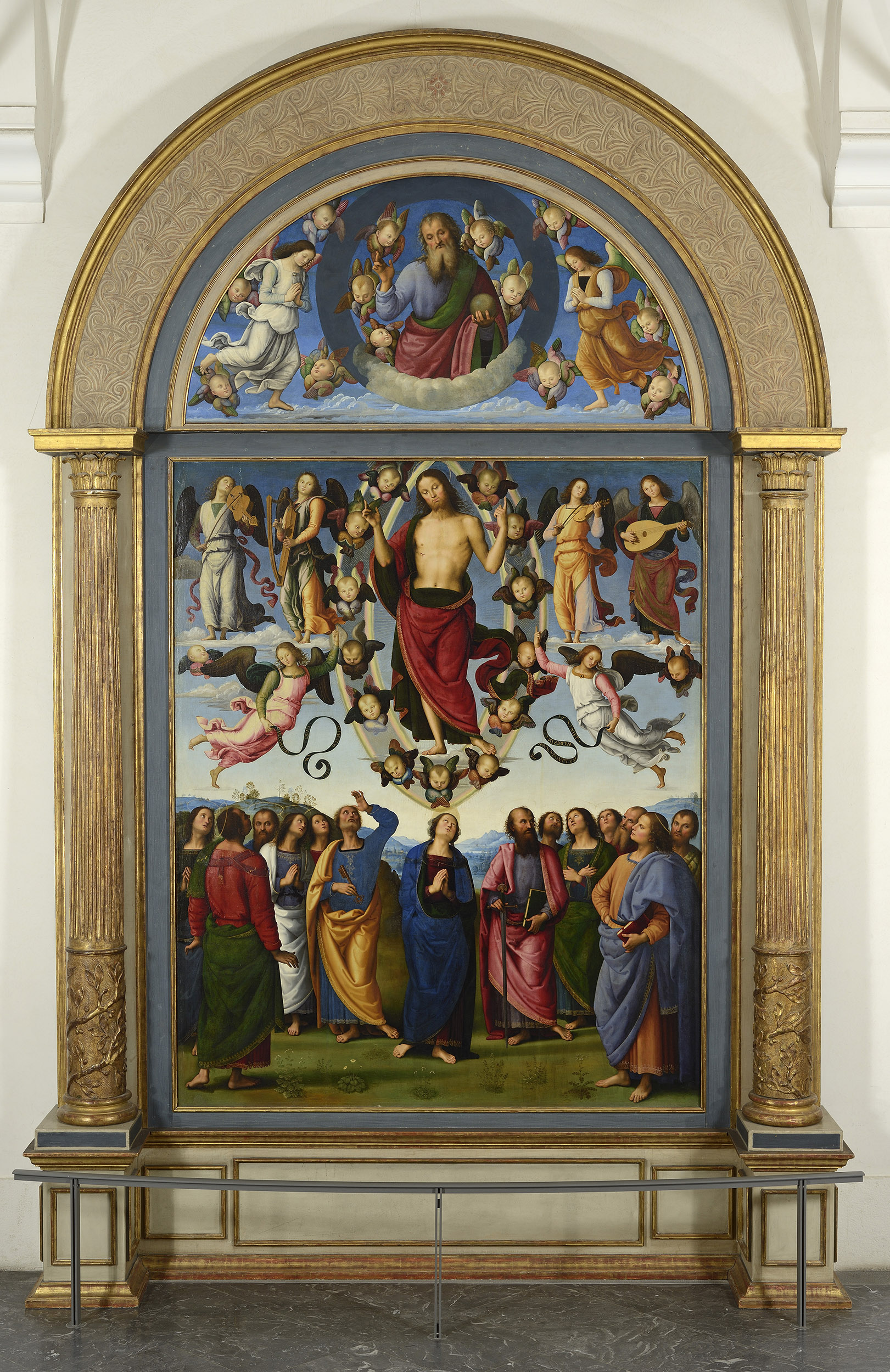 Le Pérugin, Polyptyque provenant de l'église Saint-Pierre de Pérouse : Ascension du Christ en présence de la Vierge et des apôtres